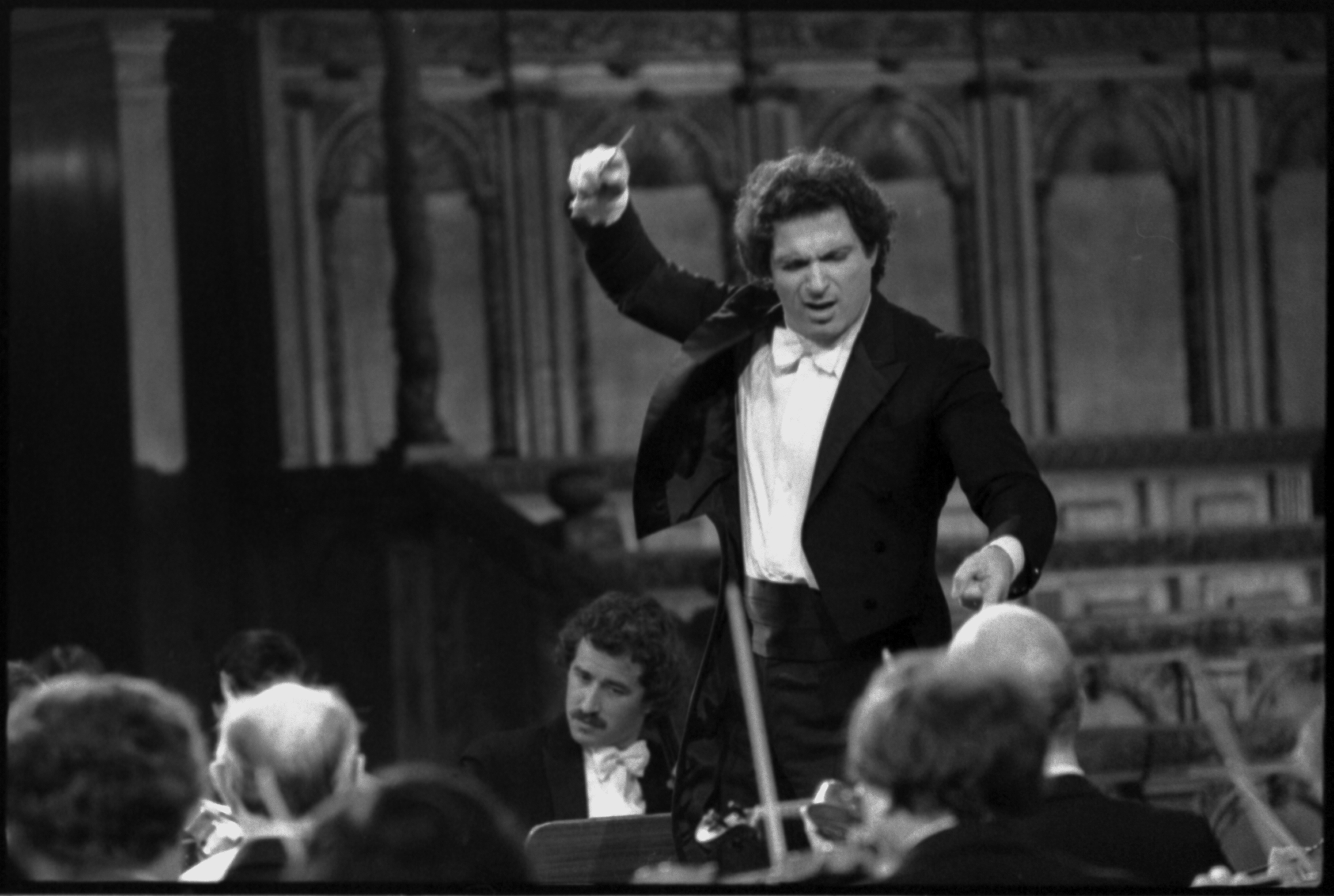 Le chef d’orchestre français Alain Lombard dirige l’Orchestre de la Résidence de la Haye 1980.